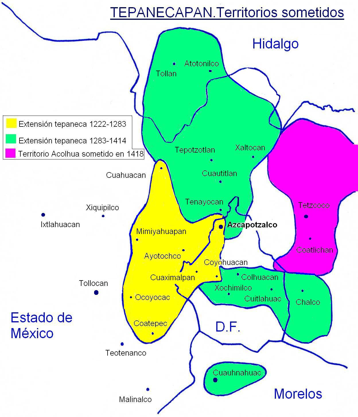 Extensión del señorio Tepaneca de 1222 a 1431.